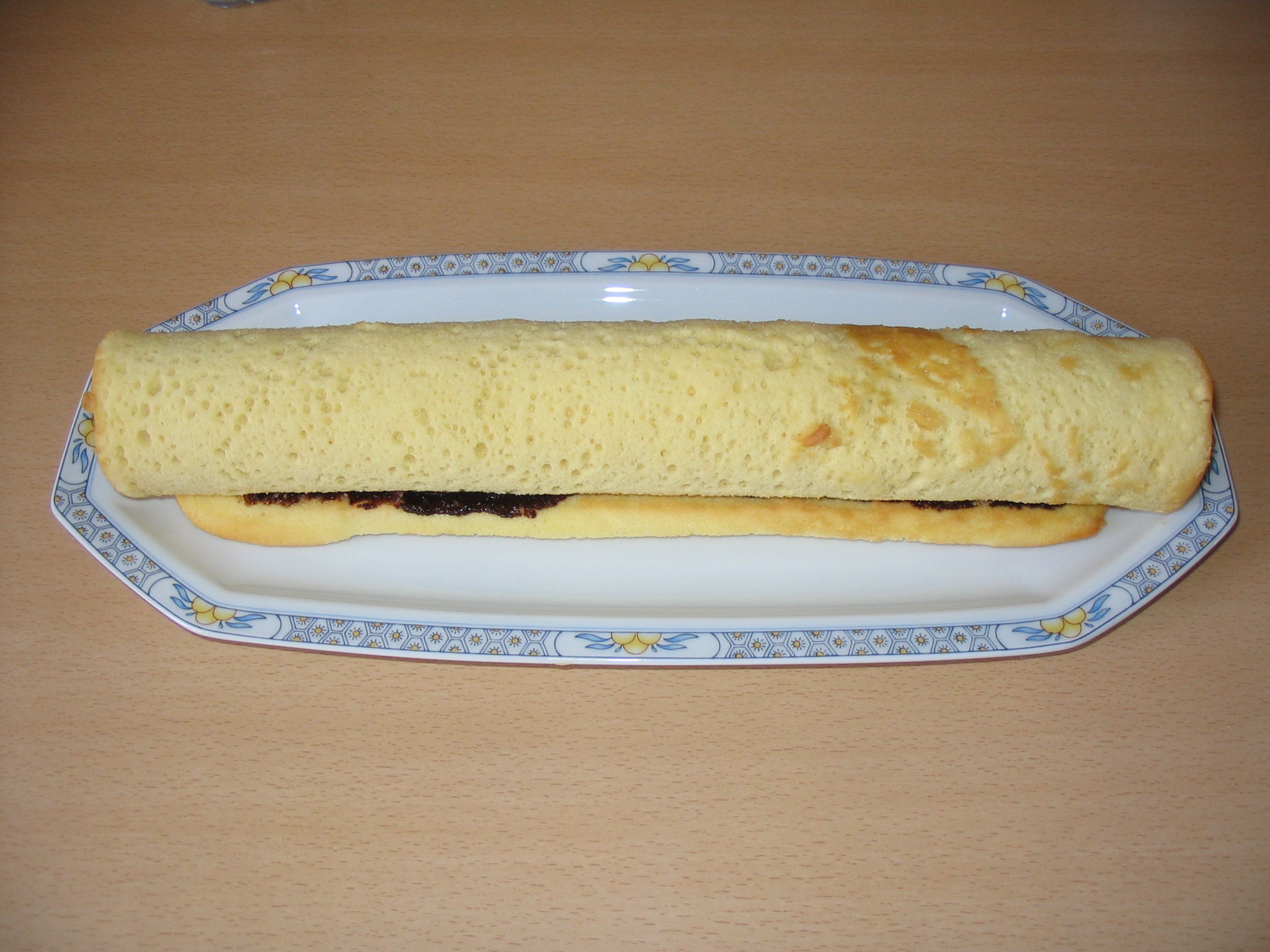 Biscuit roulé. Recette du gâteau roulé.